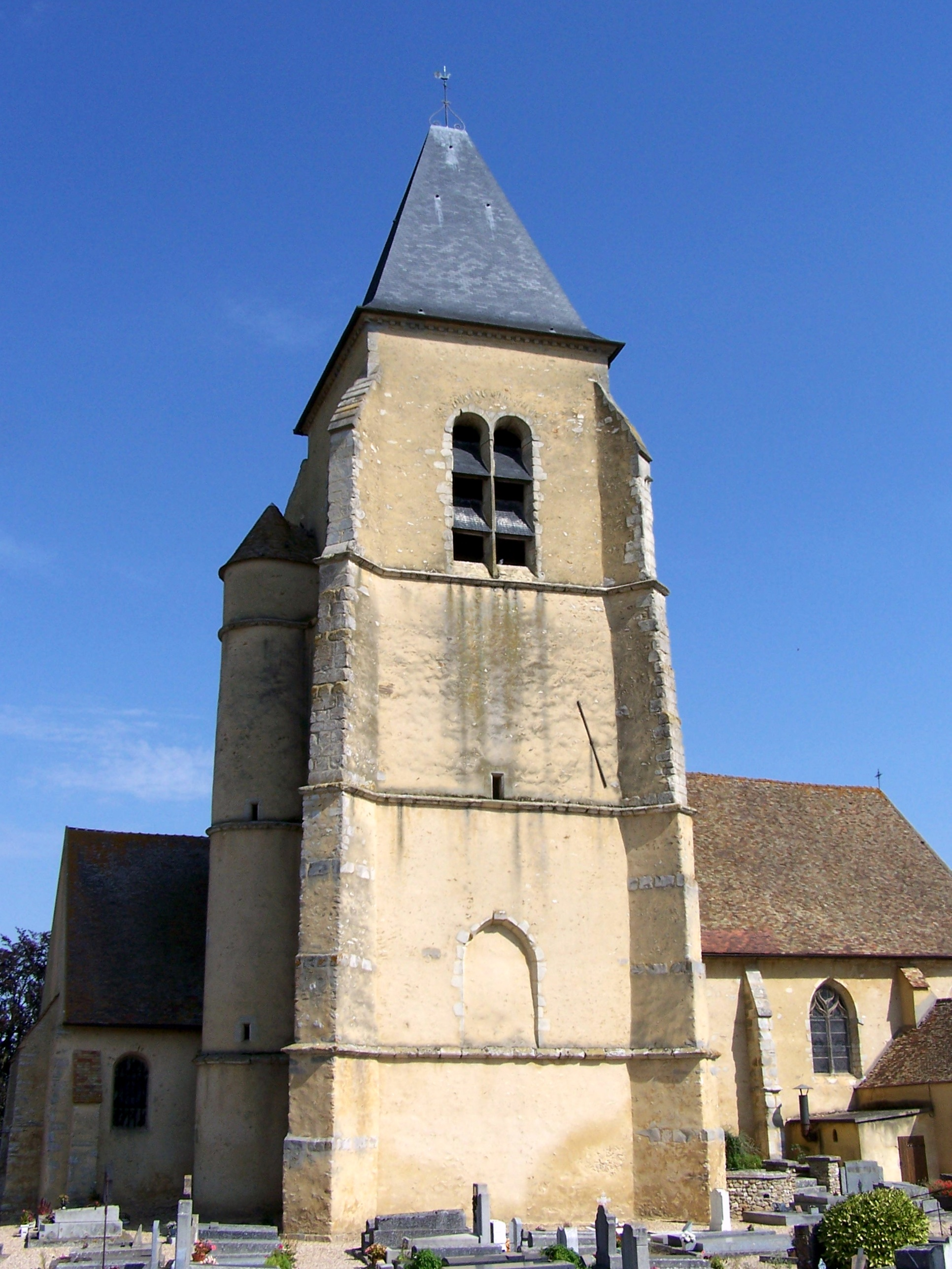 Église d'Orgerus (Yvelines, France)